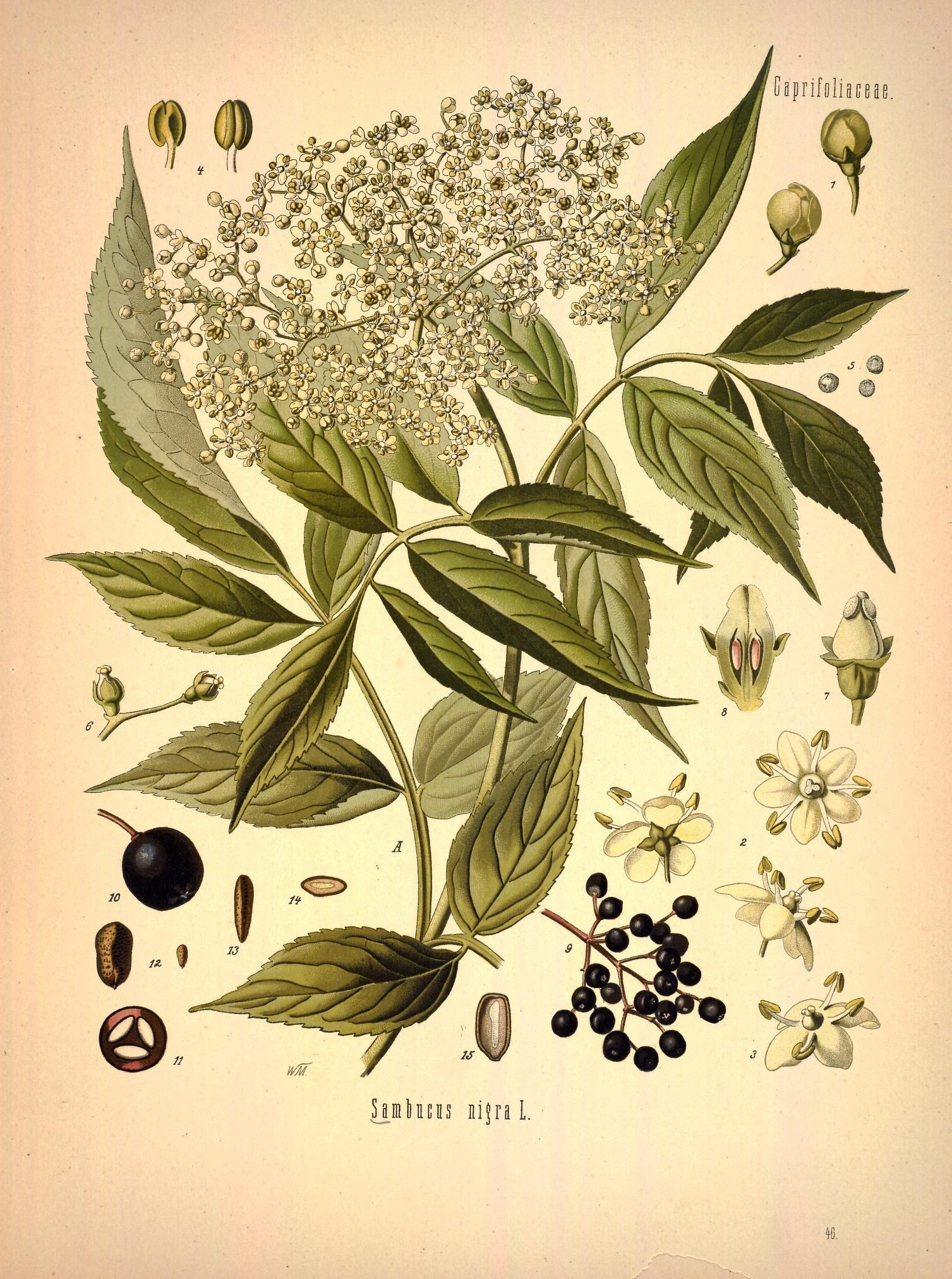 Schwarzer Holunder. A blühender Zweig in natürl. Grösse; 1 Knospen, vergrössert; 2 Blüthe mit 5 Staubgefässen, von verschiedenen Seiten, desgl.; 3 Blüthe mit 4 Staubgefässen, desgl.; 4 Staübgefäss, desgl.; 5 Pollen unter Wasser, desgl.; 6 abgeblühte Blüthe, desgl.; 7 Stempel, desgl.; 8 derselbe im Längsschnitt, desgl.; 9 Theil der Fruchttraube, natürl. Grösse; 10 Steinbeere, vergrössert; 11 dieselbe im Querschnitt, desgl.; 12 u. 13 Steinkern, natürl. Grösse und vergrössert; 14 u. 15 derselbe im Quer- und Längsschnitt.